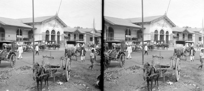 Stereonegatief. Station, Tandjong Priok